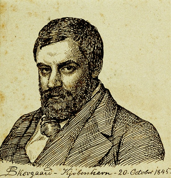 Grabado de Lorenz Frolich